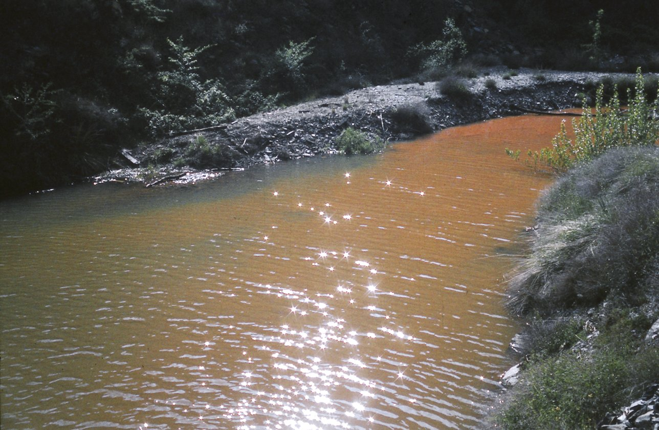 Las aguas turbias del arroyo de las presas (Almiruete) entran en el azud del Pozo de los Ramos, junto a la compuerta del canal del Sorbe